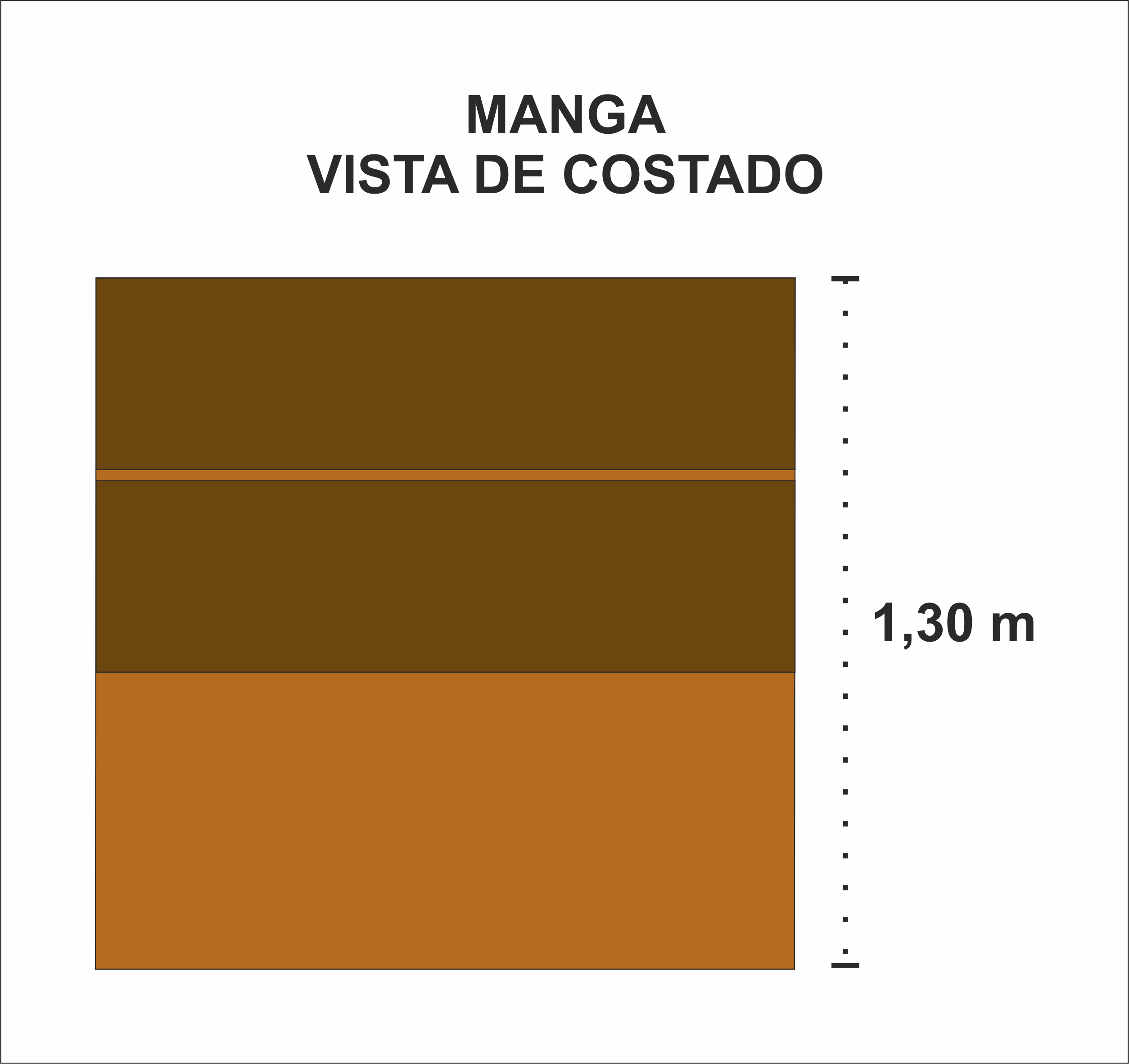 Vista de costado de una manga de paletear